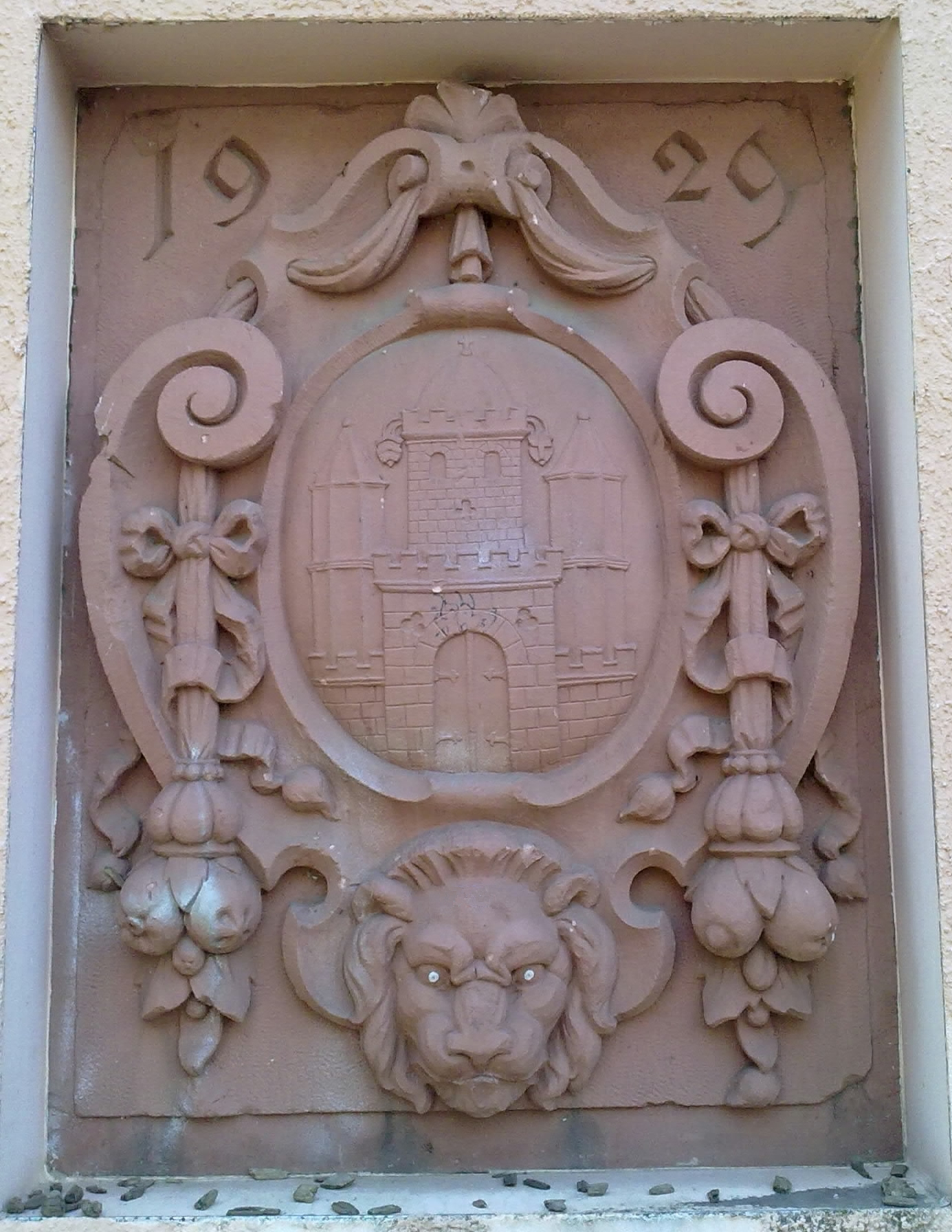 Sandstein-Wappen von Groß-Umstadt von 1929 in der Außenwand des städtischen Max-Planck-Gymnasiums